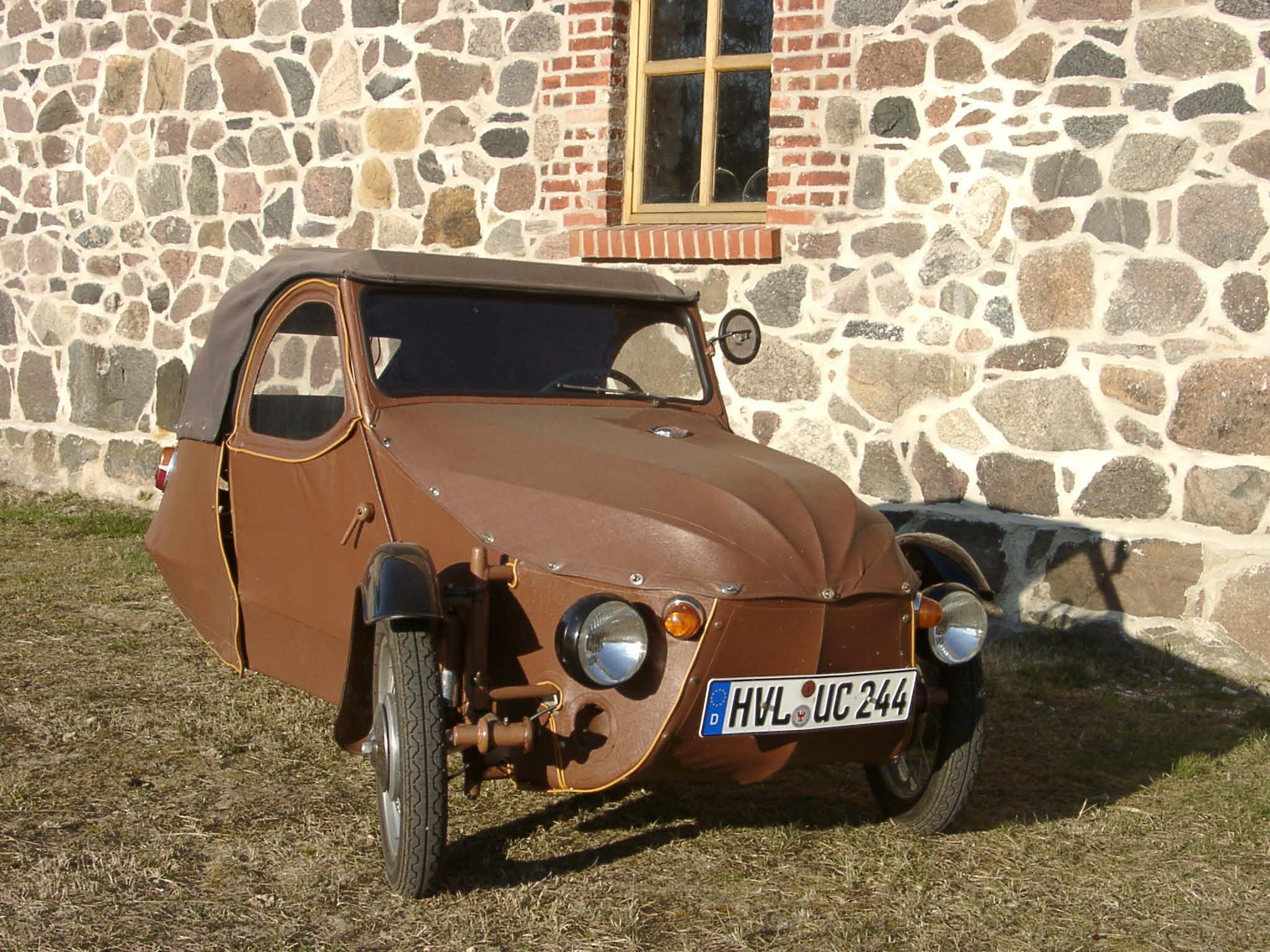 Eines der letzten serienmäßig hergestellten Exemplare: Velorex 350/16 mit dem Baujahr 1971